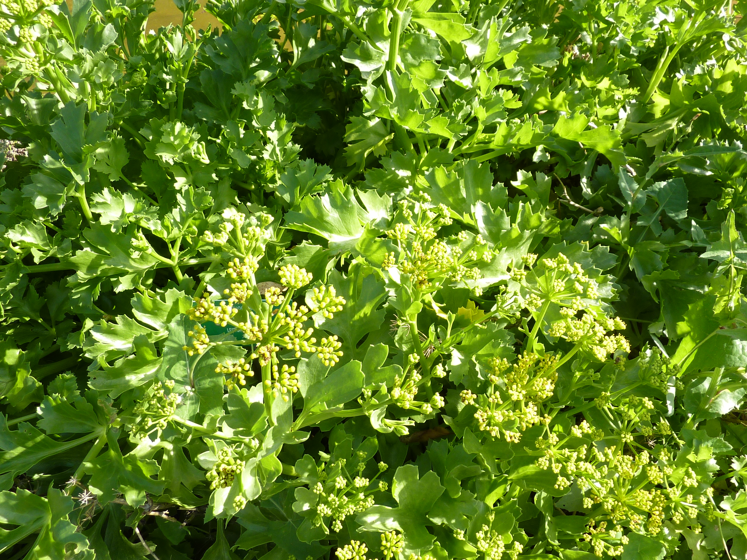 Astydamia latifolia growing in the Jardín Botánico Canario Viera y Clavijo.